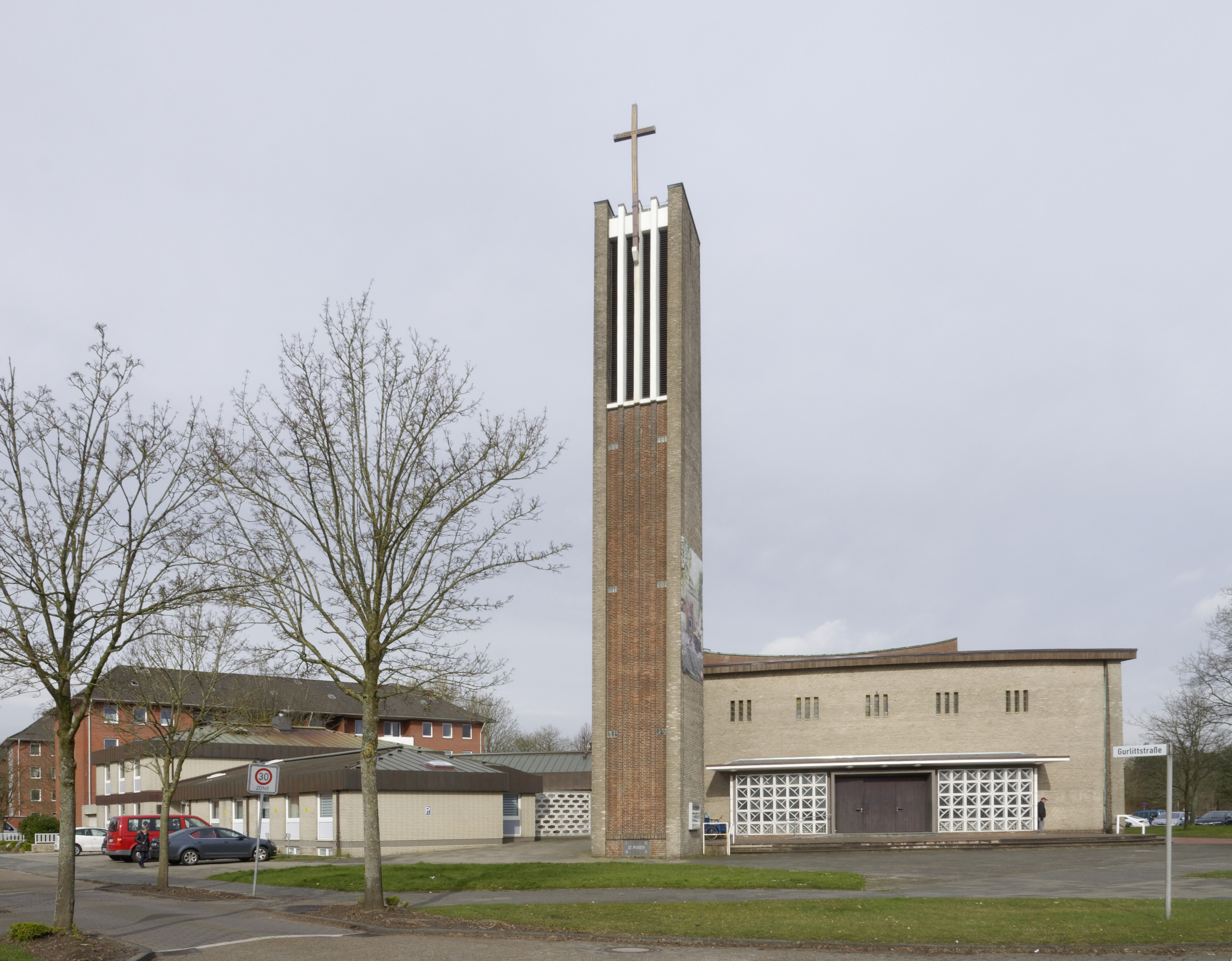 Cuxhaven 2020